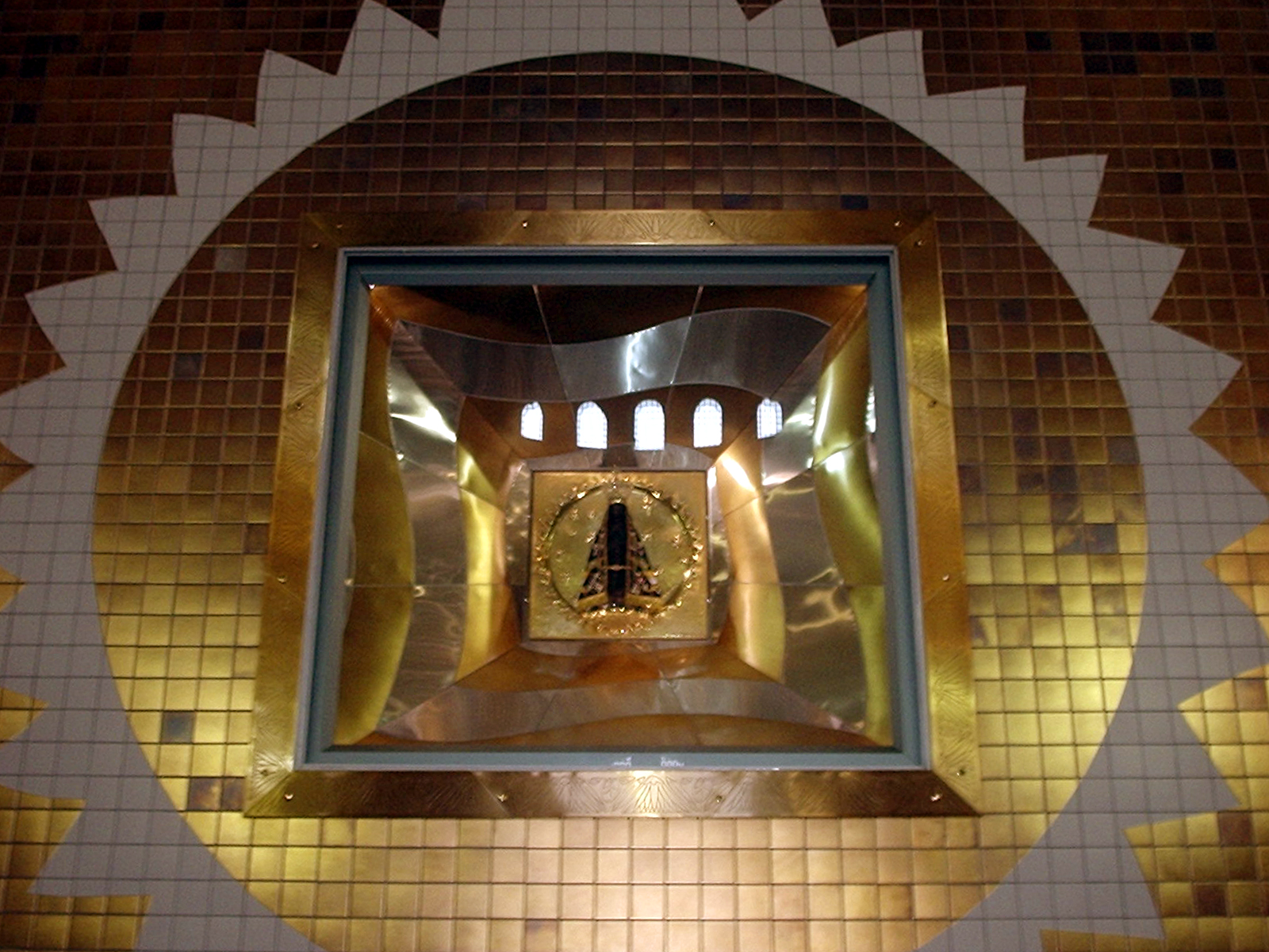 Imagem original de Nossa Senhora de Conceição Aparecida, no Santuário de Nossa Senhora, em Aparecida, São Paulo.